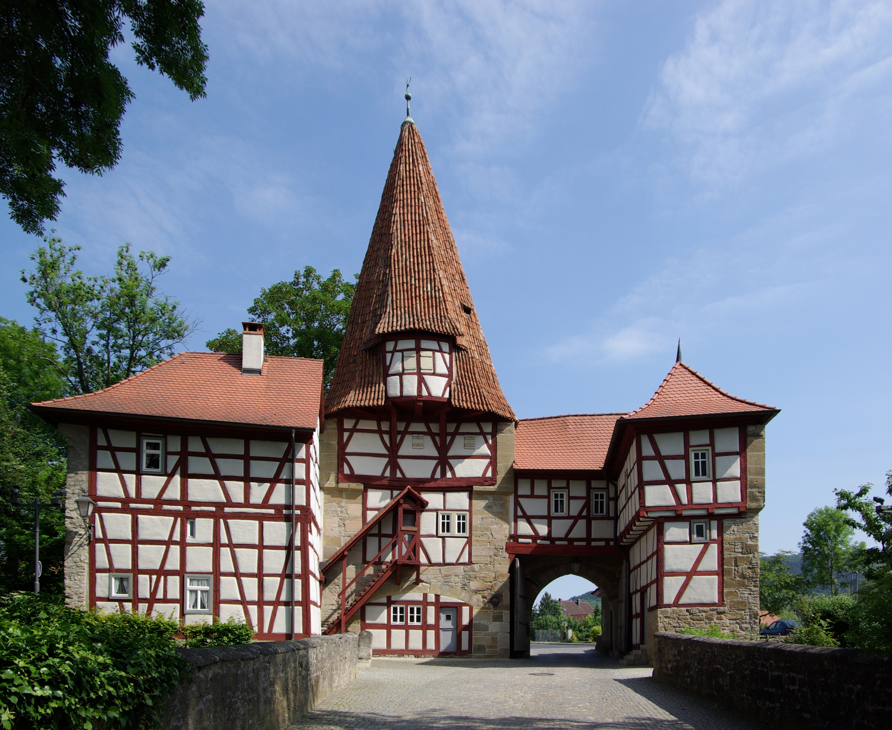 Iphofen, Rödelseer Tor, Stadtseite. Erbaut während der Regierungszeit des Bischofs Johann III. von Grumbach (1455-1466) (Wappen an der Außenseite)